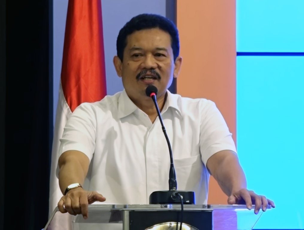 Didik Suhardi, Ph.D., Sekretaris Jenderal Kementerian Pendidikan dan Kebudayaan Republik Indonesia (2015-2019)